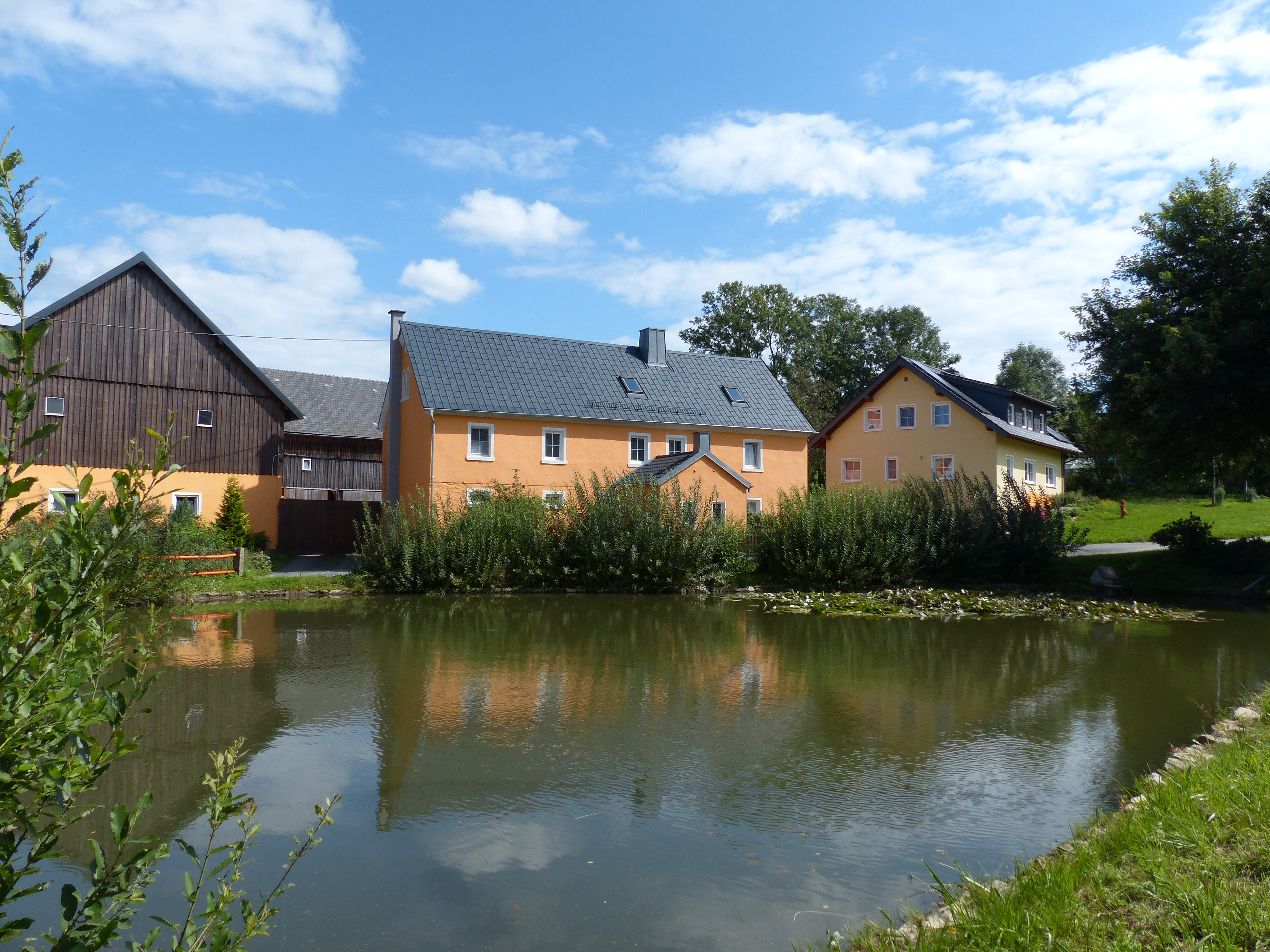 Ansicht von Silberbach, Ortsteil von Konradsreuth